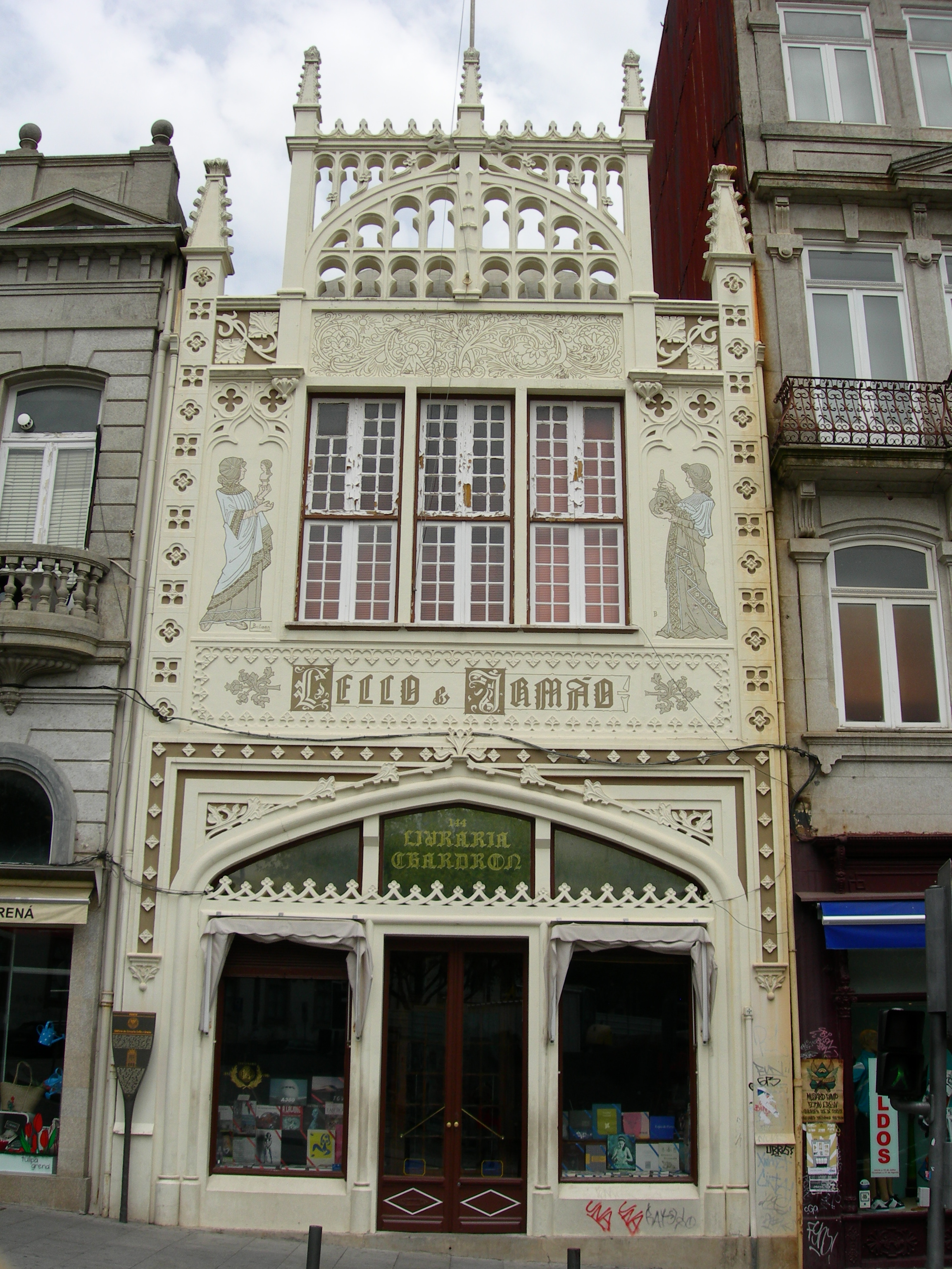 Livraria Lello e Irmão, na Rua das Carmelitas nº 144. Em Portugal, Porto, Porto, Vitória. This file was uploaded for Wiki Loves Monuments in Portugal with the unique identifier 72272.